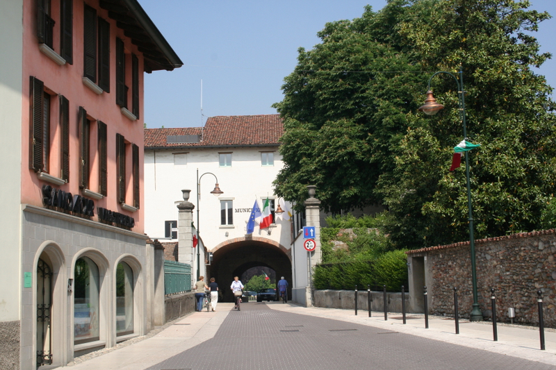 Cologno al Serio, il Municipio dal retro.